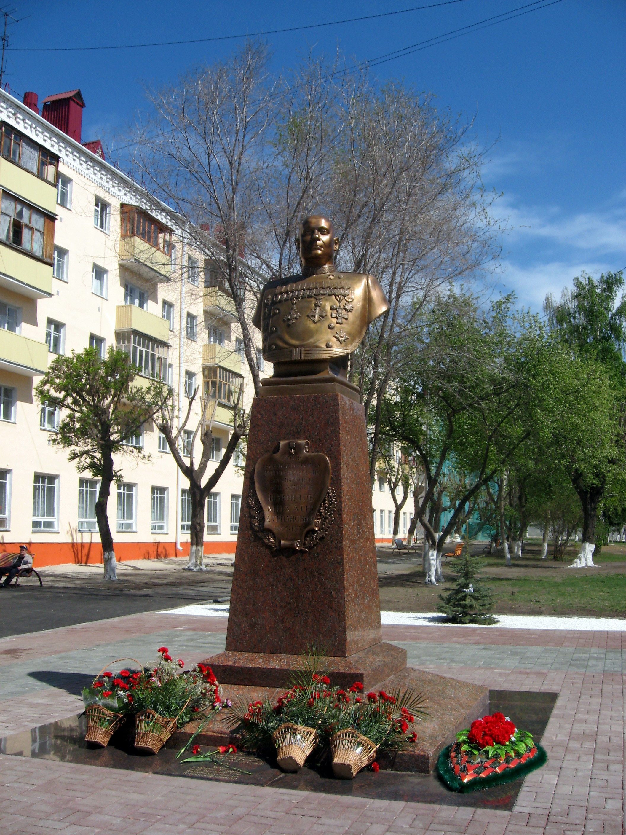 Памятник Шумилову М.С. в г. Кургане